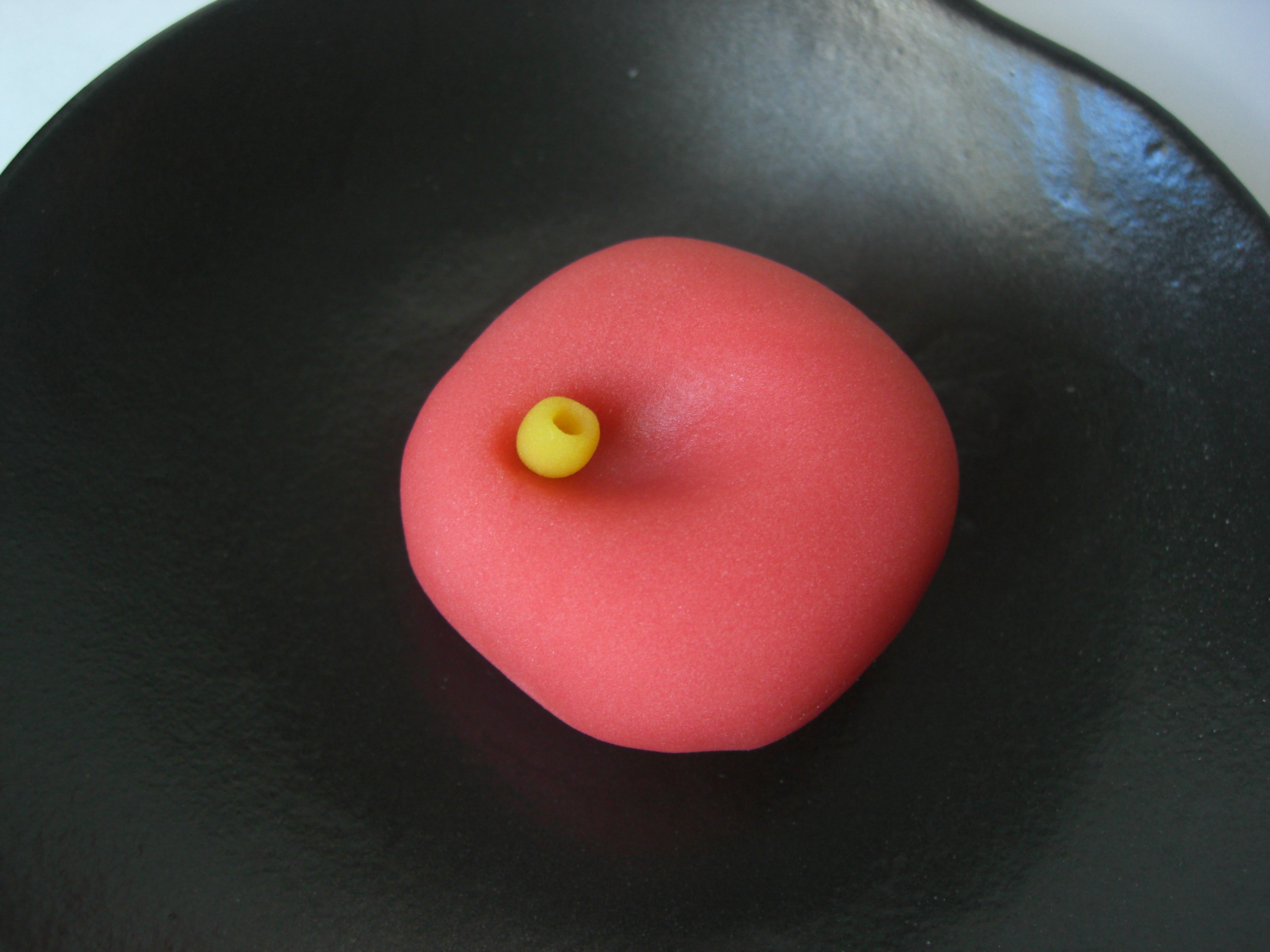 寒椿（かんつばき） 小豆こし餡を「こなし」で包んだ和菓子 両口屋是清 12月